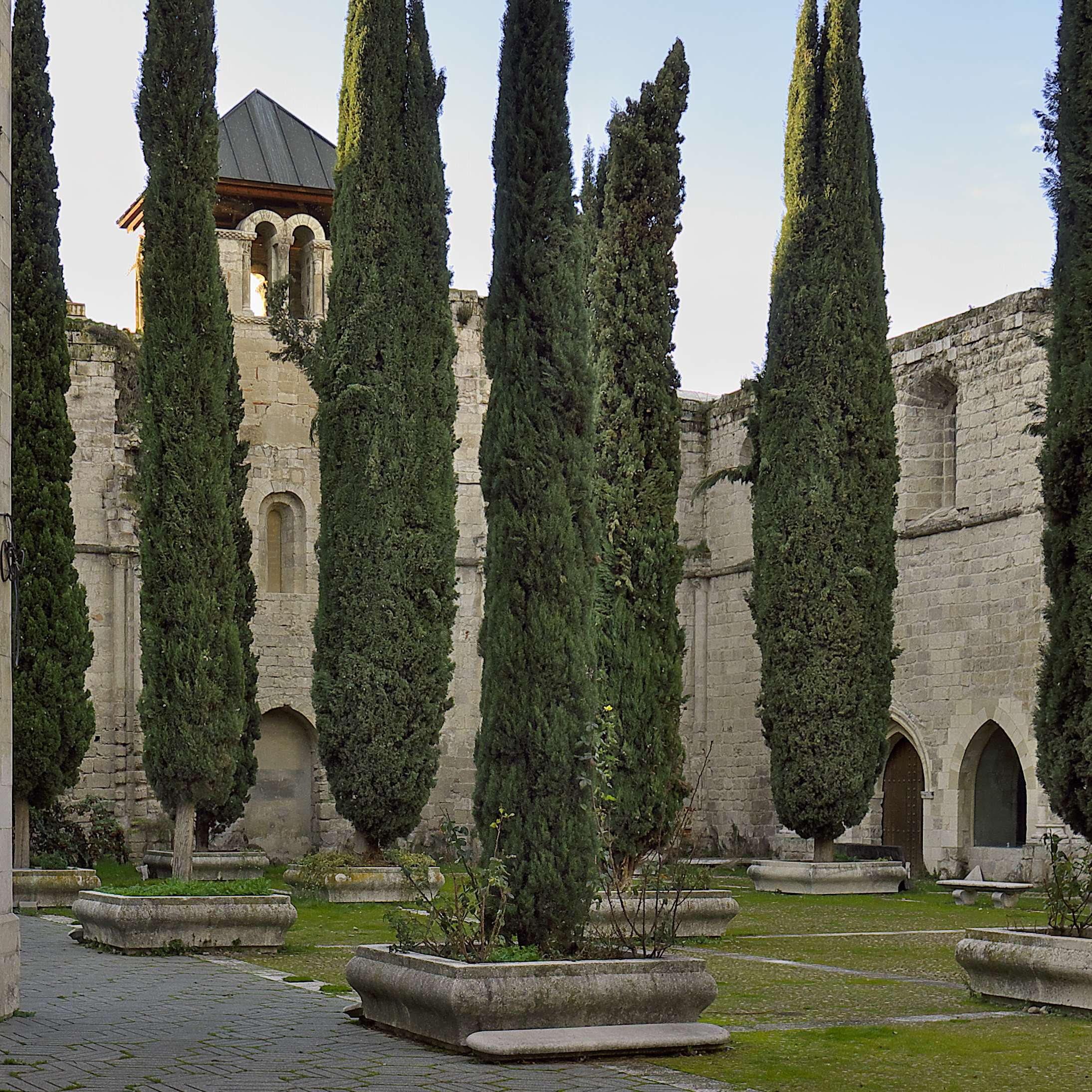 Planta de la iglesia de la Colegiata de Santa María la Mayor (Valladolid). Pedro Ansúrez no alcanzó se propósito de construir una gran colegiata en Valladolid. Actualmente se conservan escasos restos de la obra románica y de su etapa gótica.